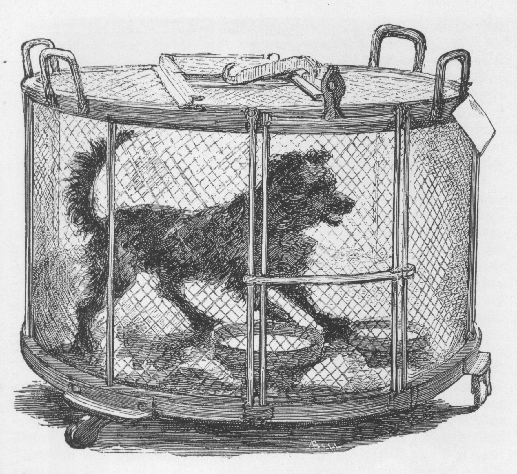 Louis Pasteurs Tierversuchen. Käfig mit geimpften Hund